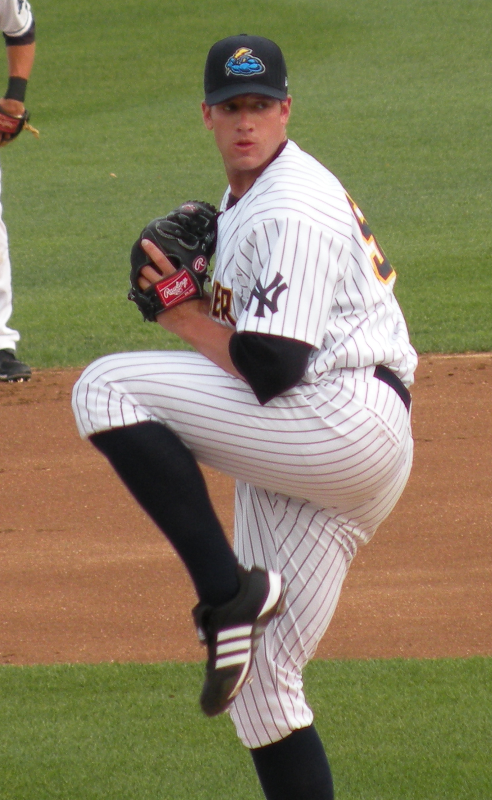 Zach McAllister